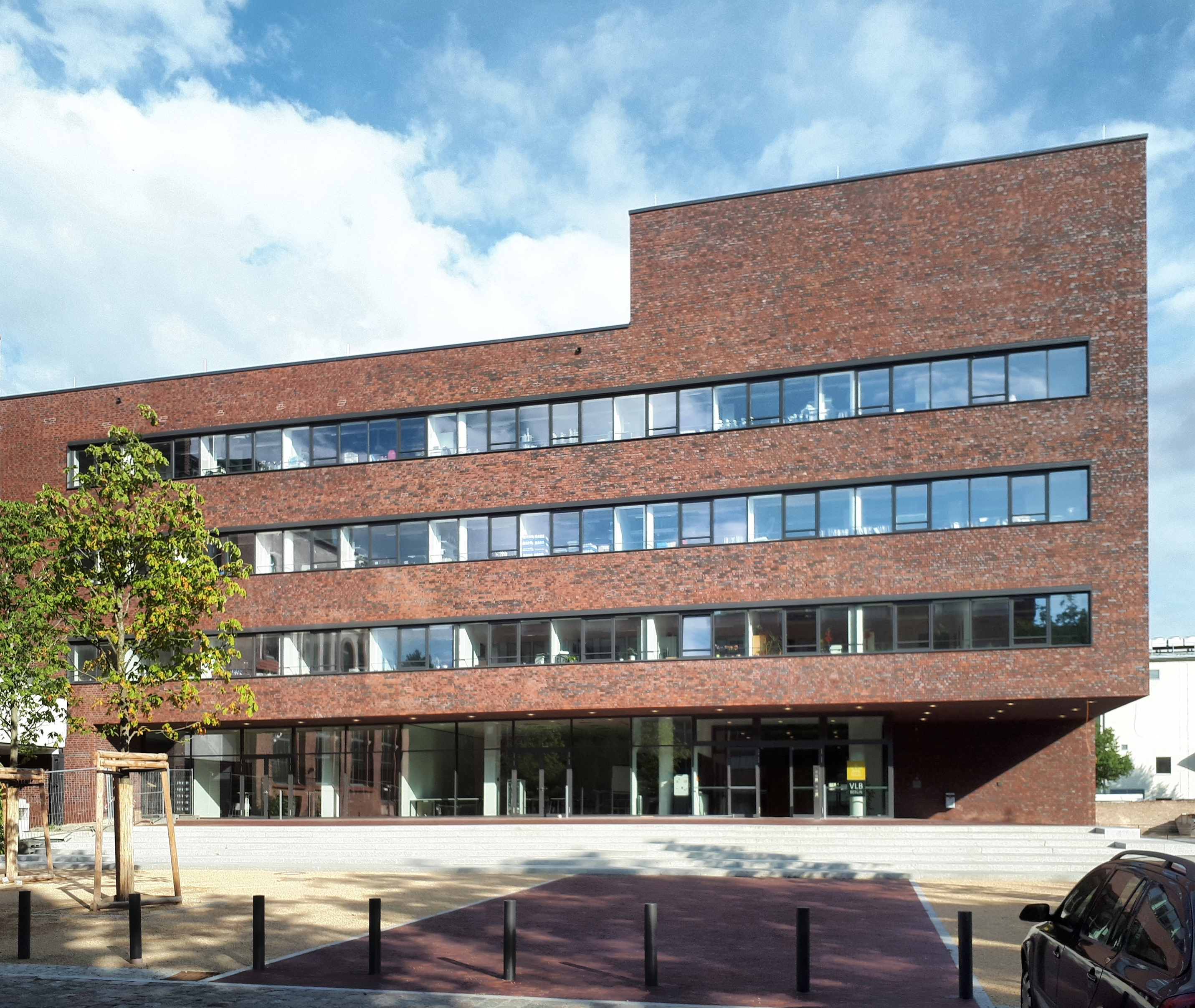 VLB Berlin Neubau Eingang